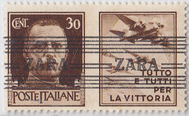 Почтовая марка, выпущенная немецкими оккупационными войсками для Задара (Хорватия) Postage stamp issued by the German occupation forces for Zadar (Croatia)